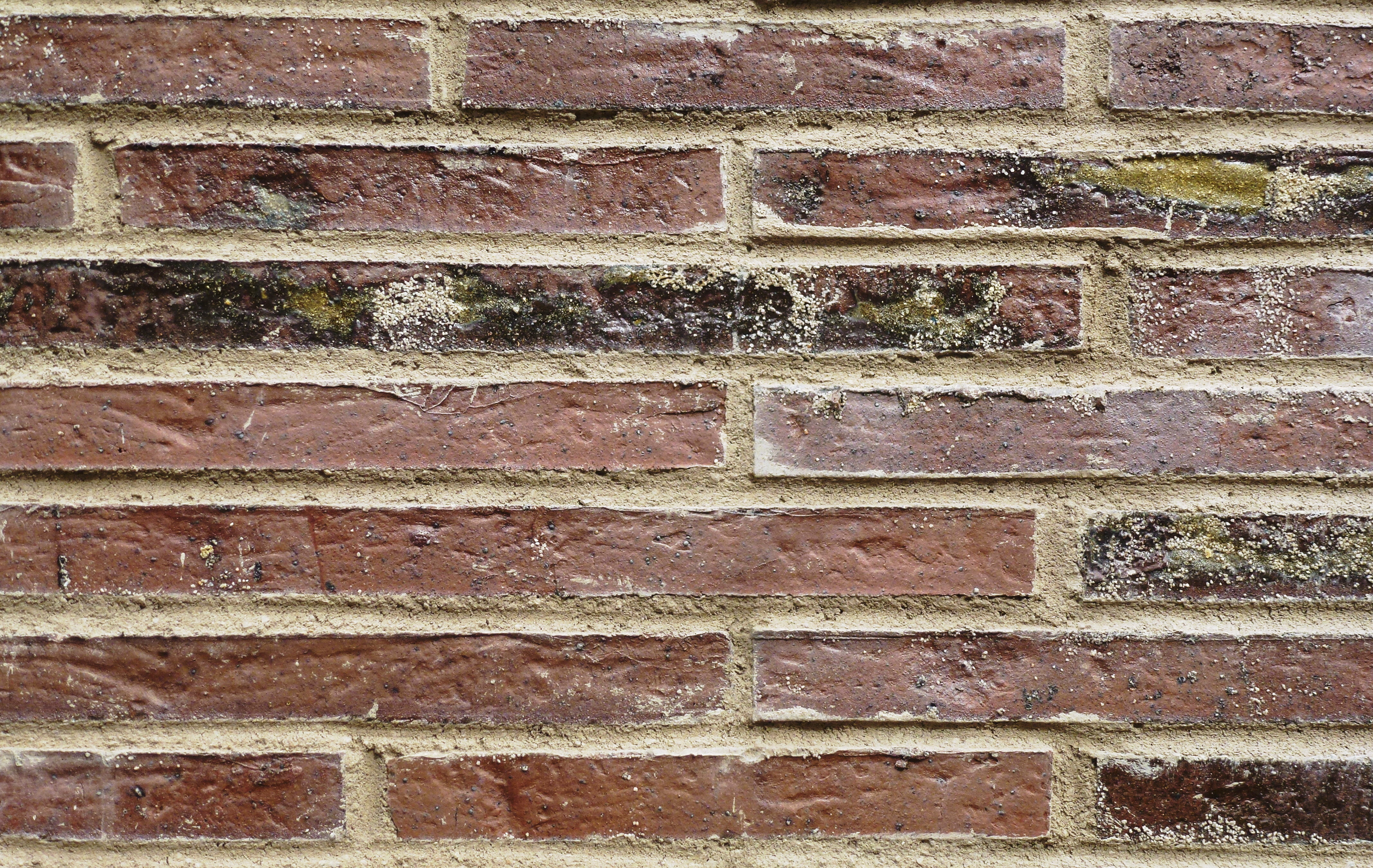 Skogskrematoriet II (Nya skogskrematoriet på Skogskyrkogården), tegelmurning, detalj